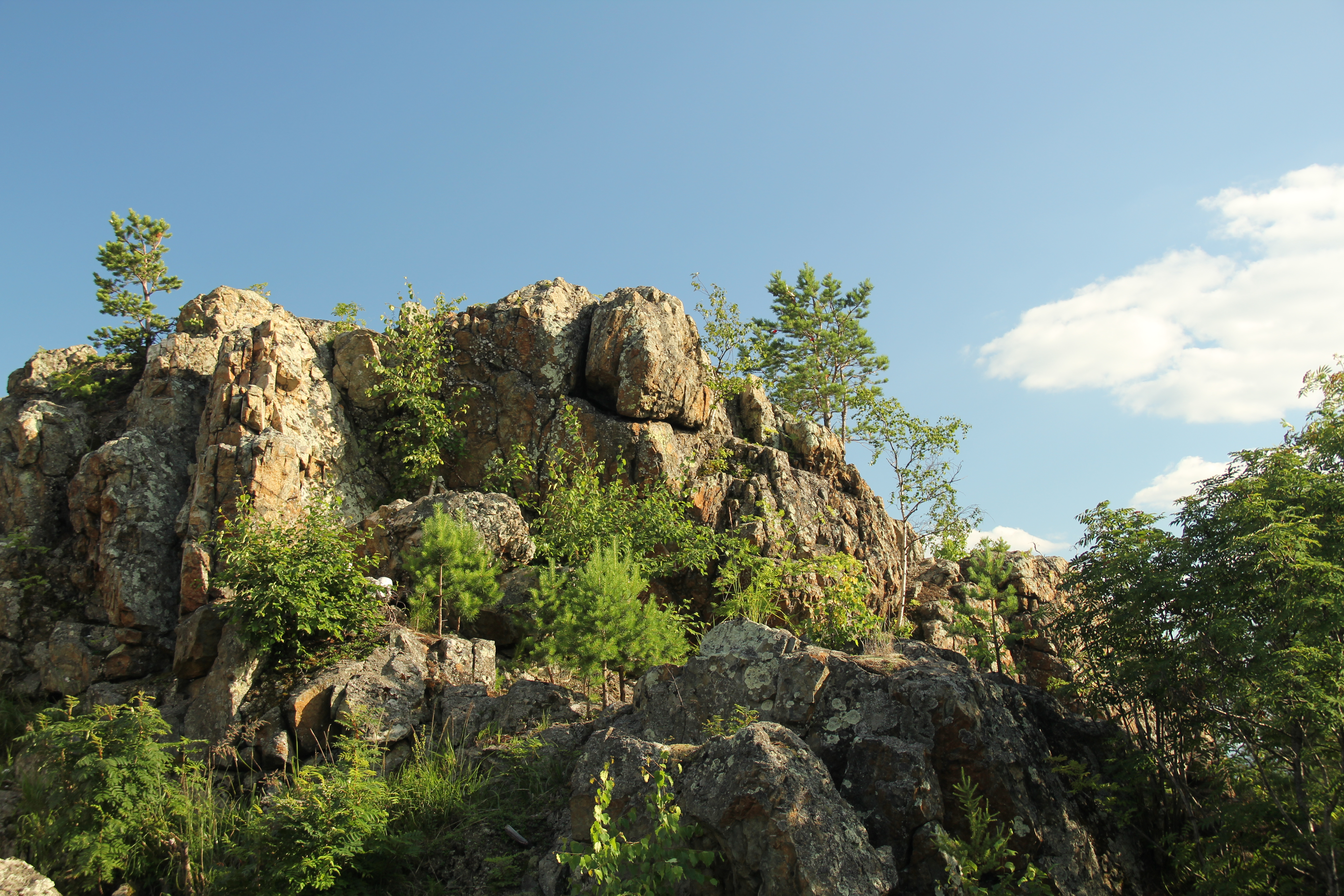 Гора "Азов", Полевской This image is related to the protected area of Russia number 6610536